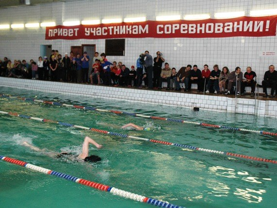 Соревнования в собственном бассейне ЕАТК ГА